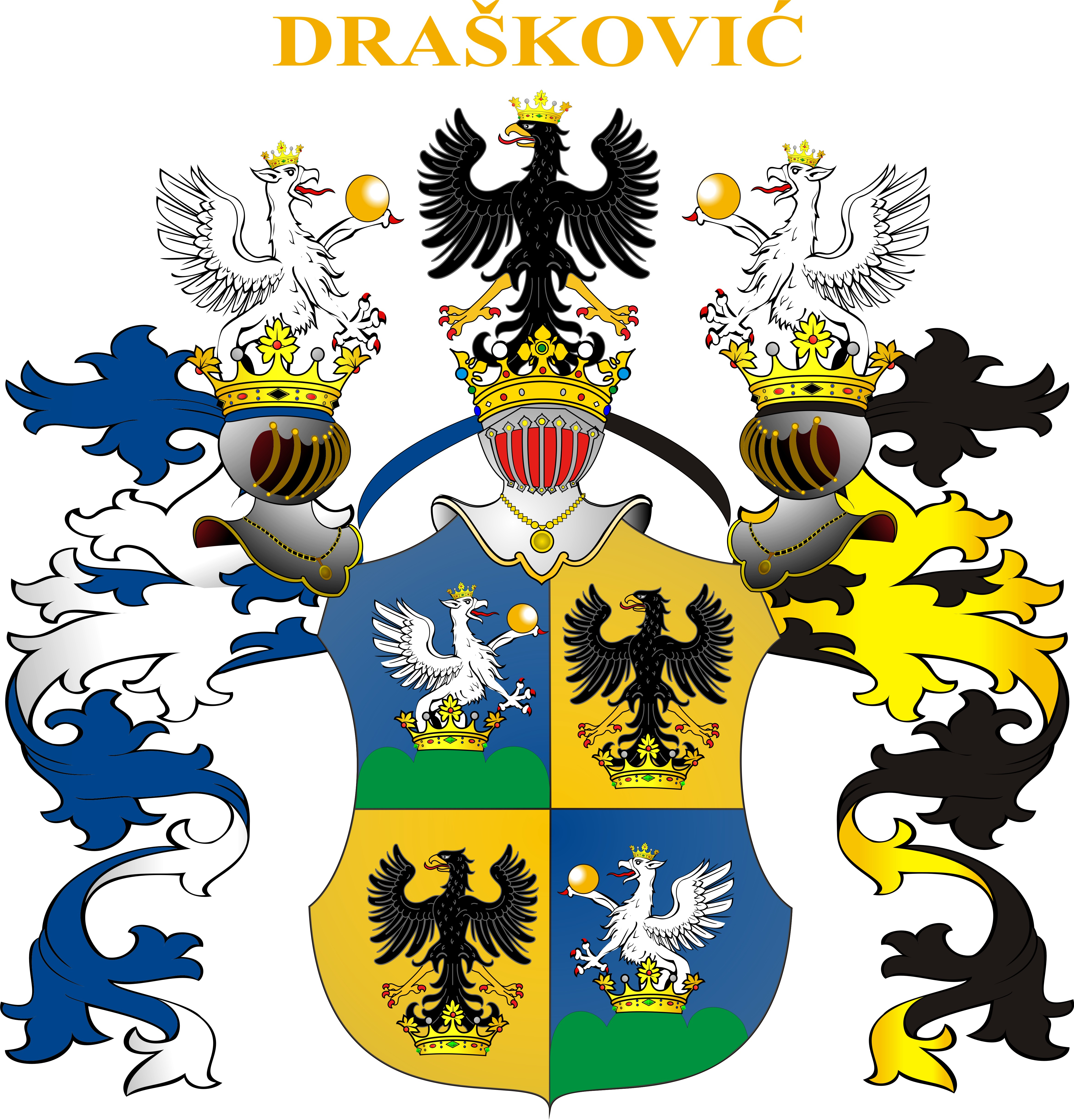 Grb obitelji Drašković